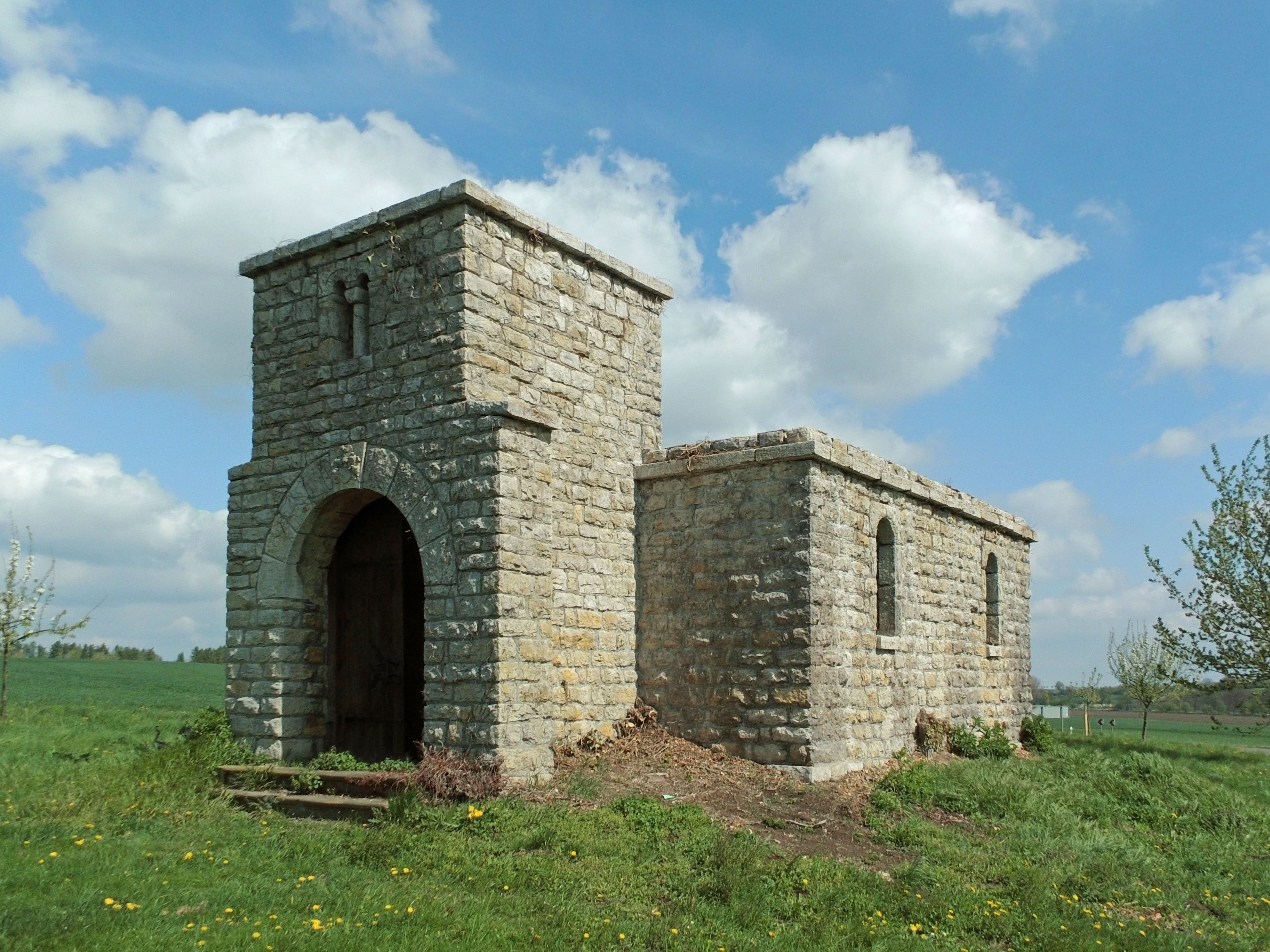 Ruine in Deersheim.